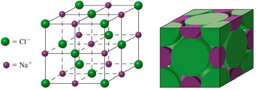 Sodio kloruroaren egitura